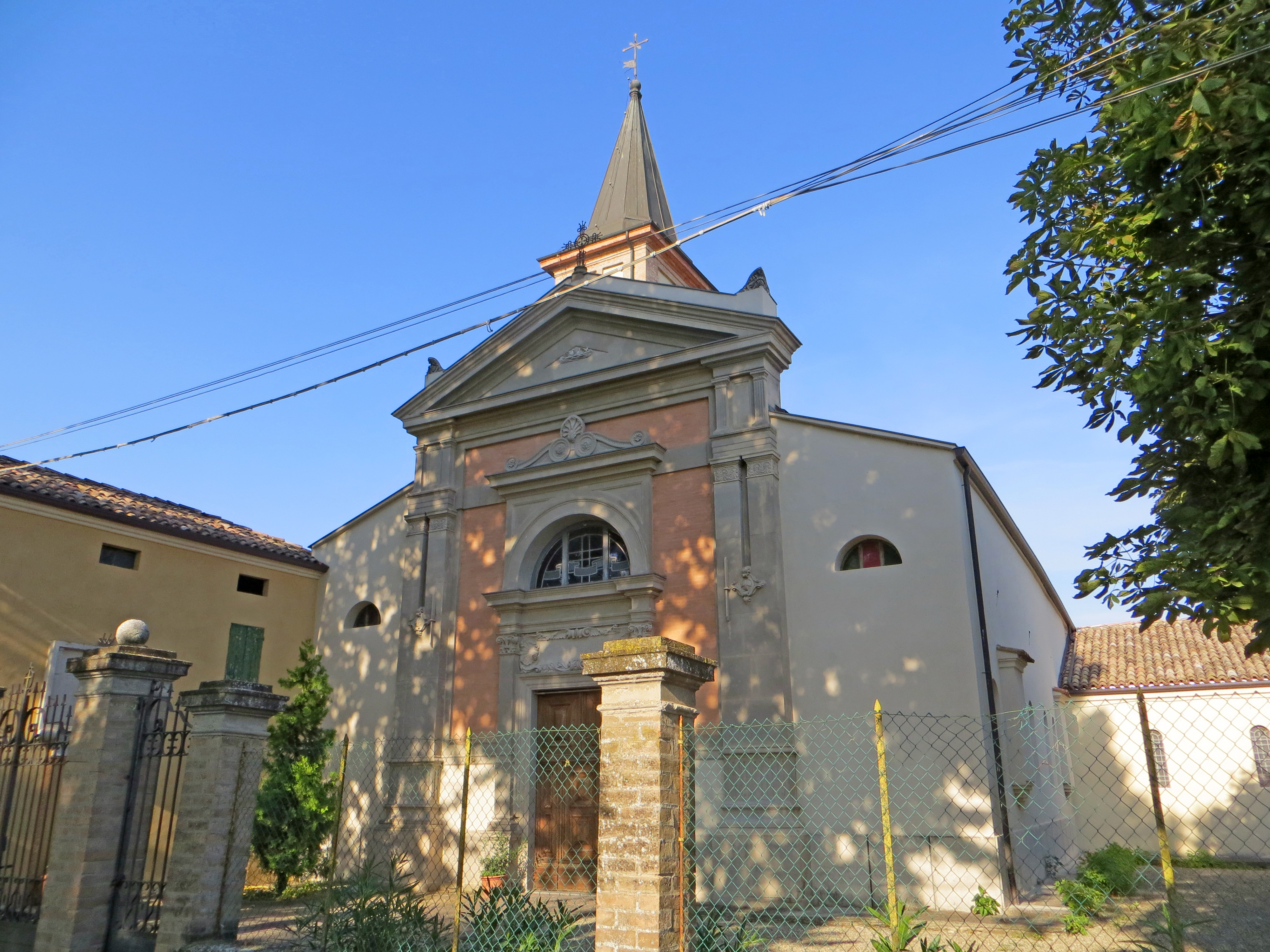 Chiesa della Purificazione di Maria Vergine (Marano, Parma) - facciata e lato sud